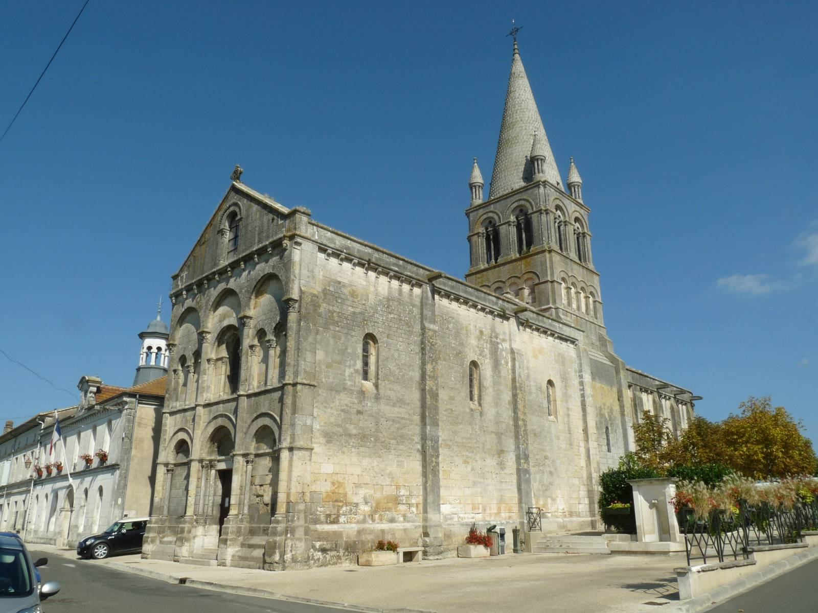 église de Roullet (16), France